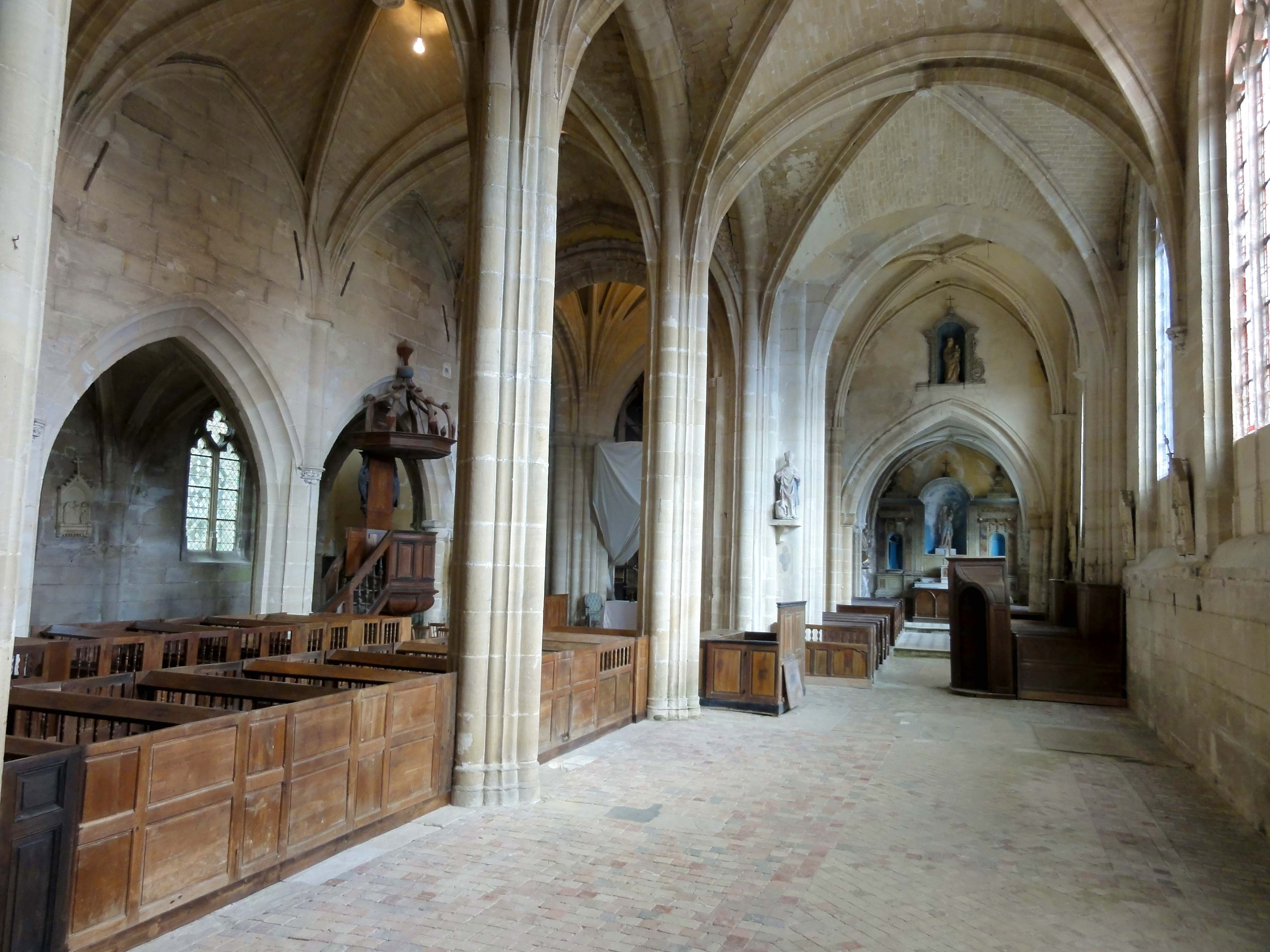 Intérieur de l'église - voir le titre du fichier.